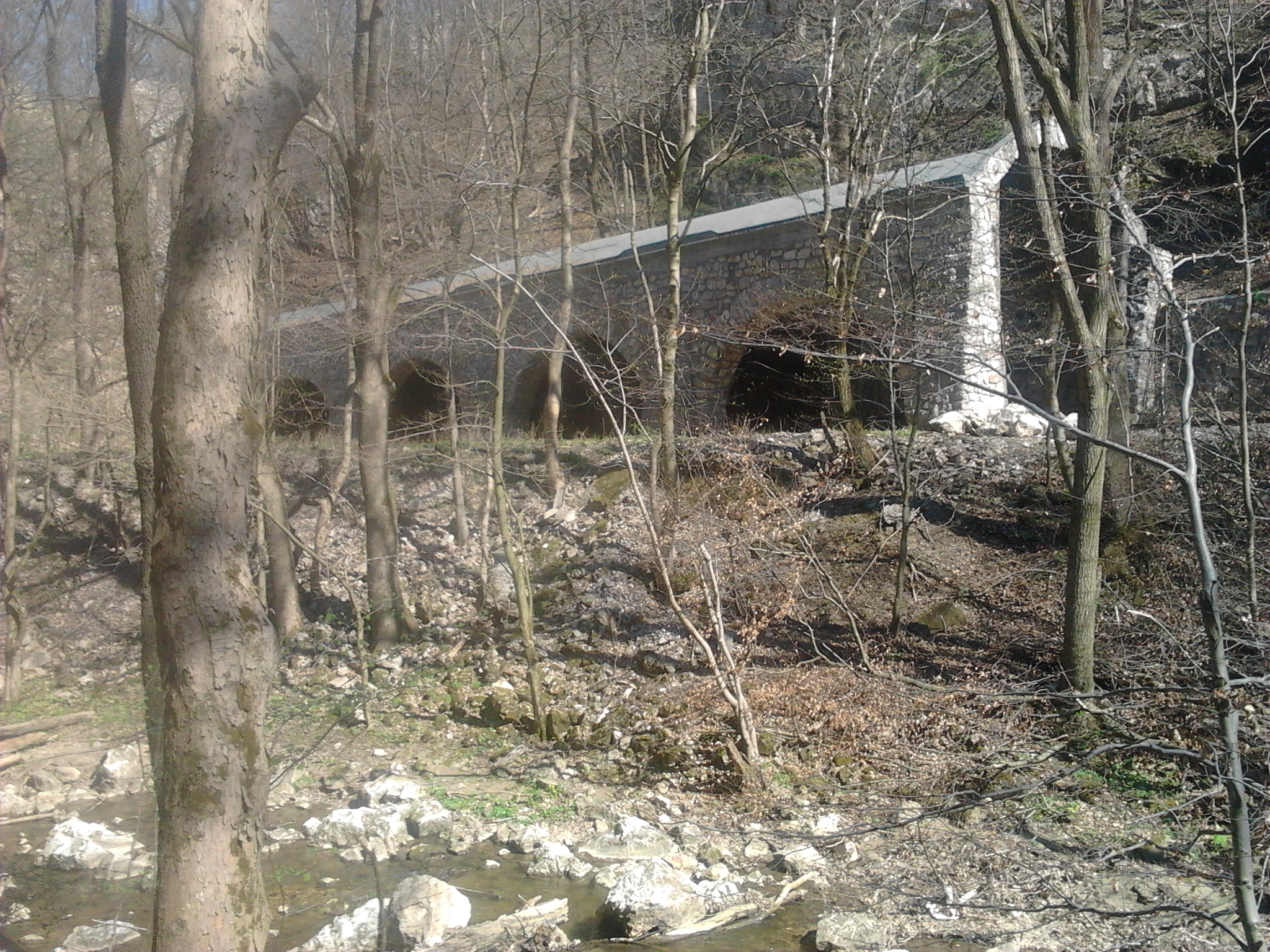 Az Alsó-Porvai alagút omlásvédője a Cuha patak mentén.